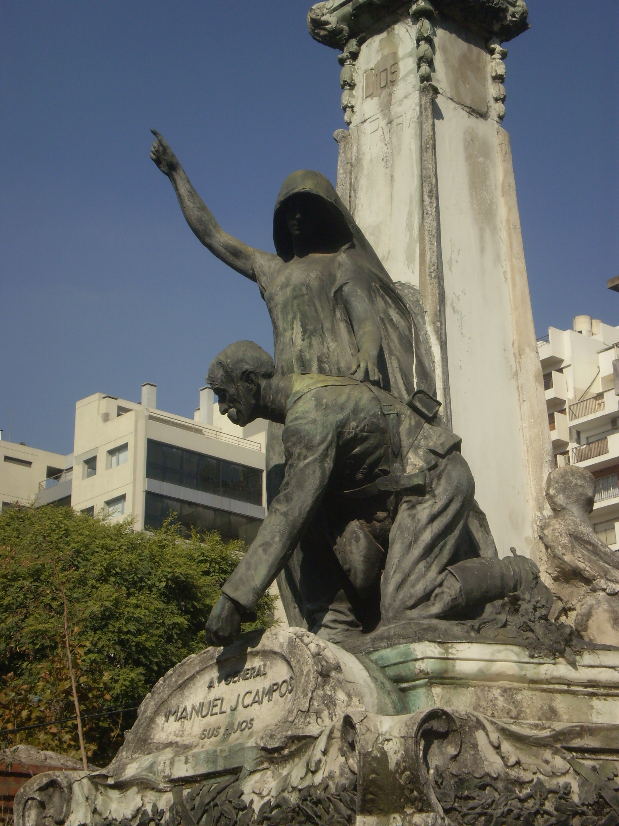 Detalle de la tumba de Manuel J. Campos. Cementerio de la Recoleta. Buenos Aires. Escultura de José Llaneces